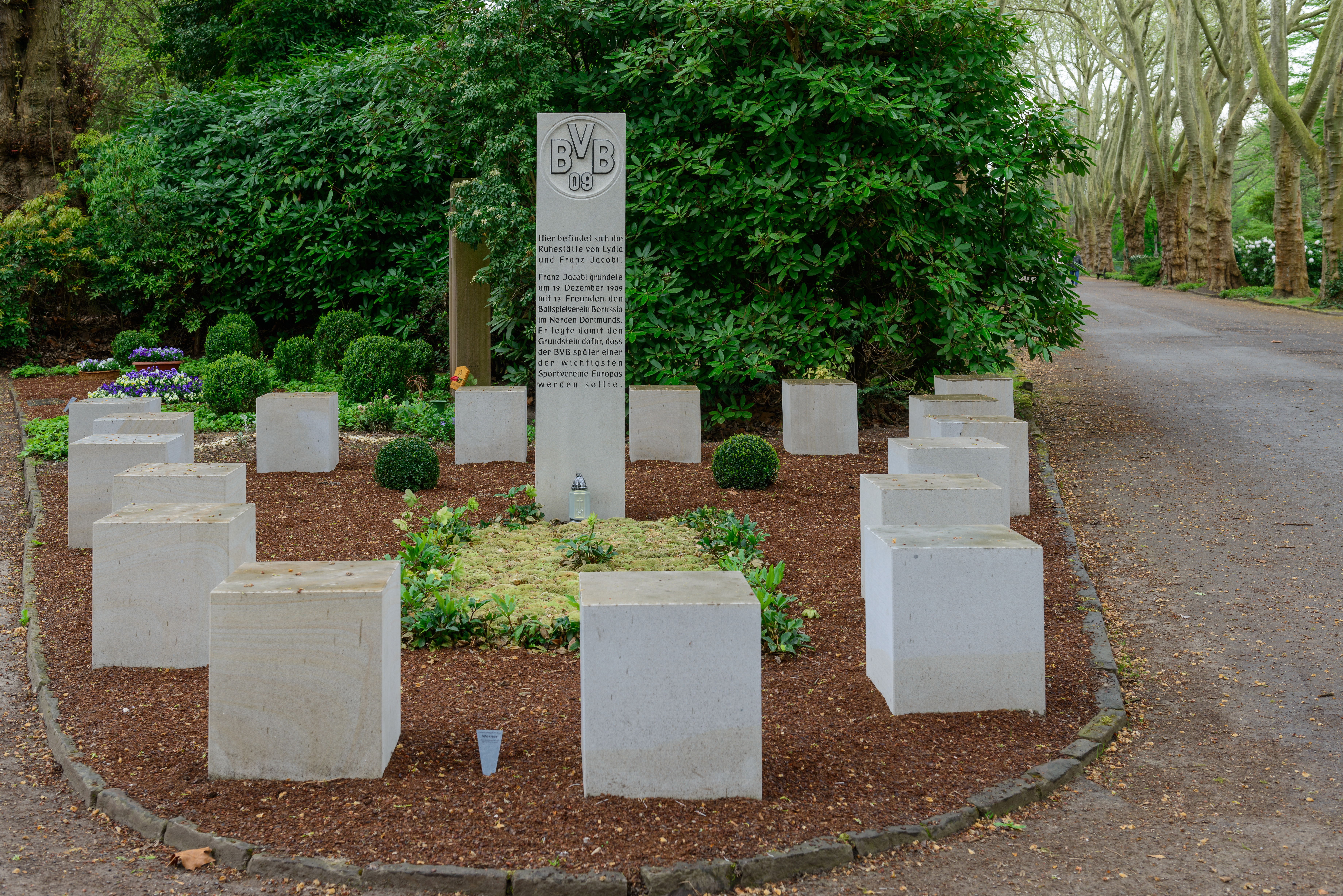 Franz Jacobi: Grab auf Südwestfriedhof Dortmund. Grabstein mit der Inschrift: "Hier befindet sich die Ruhestätte von Lydia und Franz Jacobi. Franz Jacobi gründete am 19. Dezember 1909 mit 17 Freunden den Ballspielverein Borussia im Norden Dortmunds. Er legte damit den Grundstein dafür, dass der BVB später einer der wichtigsten Sportvereine Europas werden sollte." Seine 17 Freunde werden doch 17 kleine Grabsteine ohne Inschrift symbolisiert.